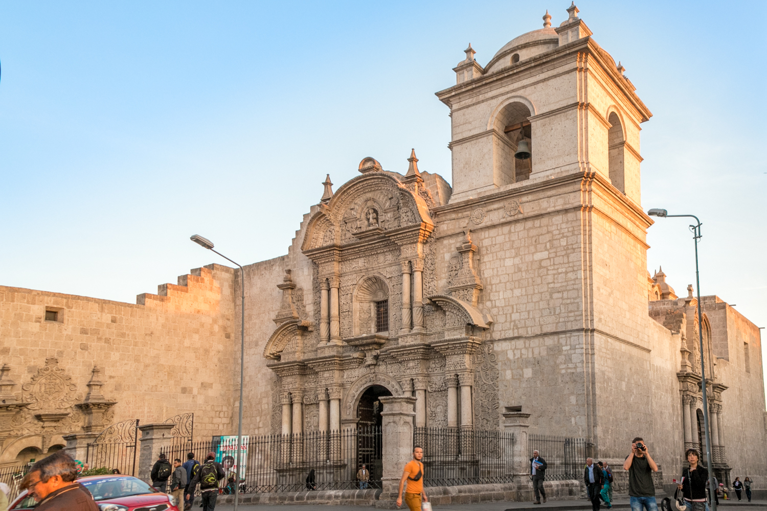 Arquitectura en base al sillar, piedra volcánica producto de las erupciones de la zona en el pasado